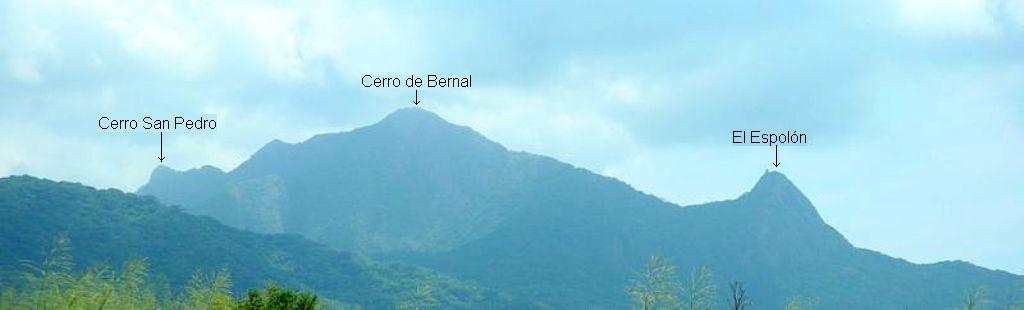 Sitios del Cerro de Bernal